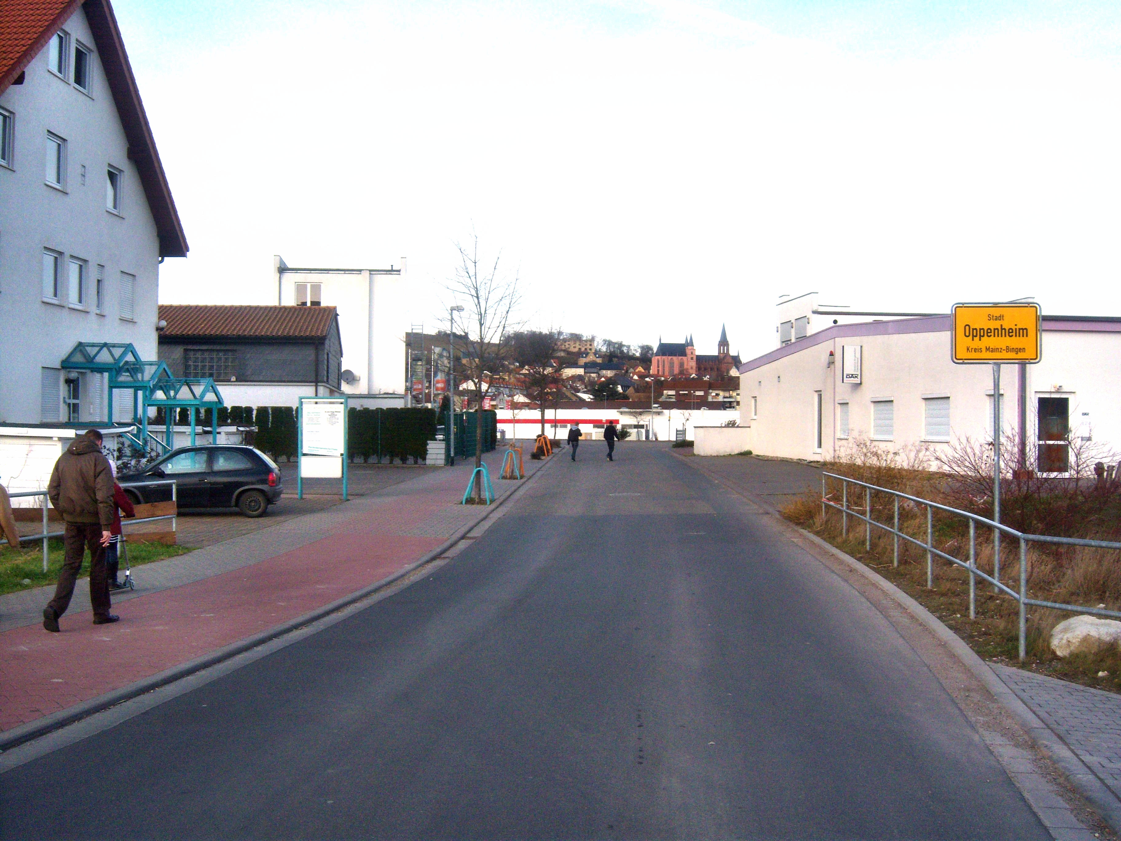 Stadteinfahrt von Oppenheim in Rheinhessen (Deutschland), von Dienheim kommend- im Hintergrund die Burg Landskron sowie die Oppenheimer Katharinenkirche